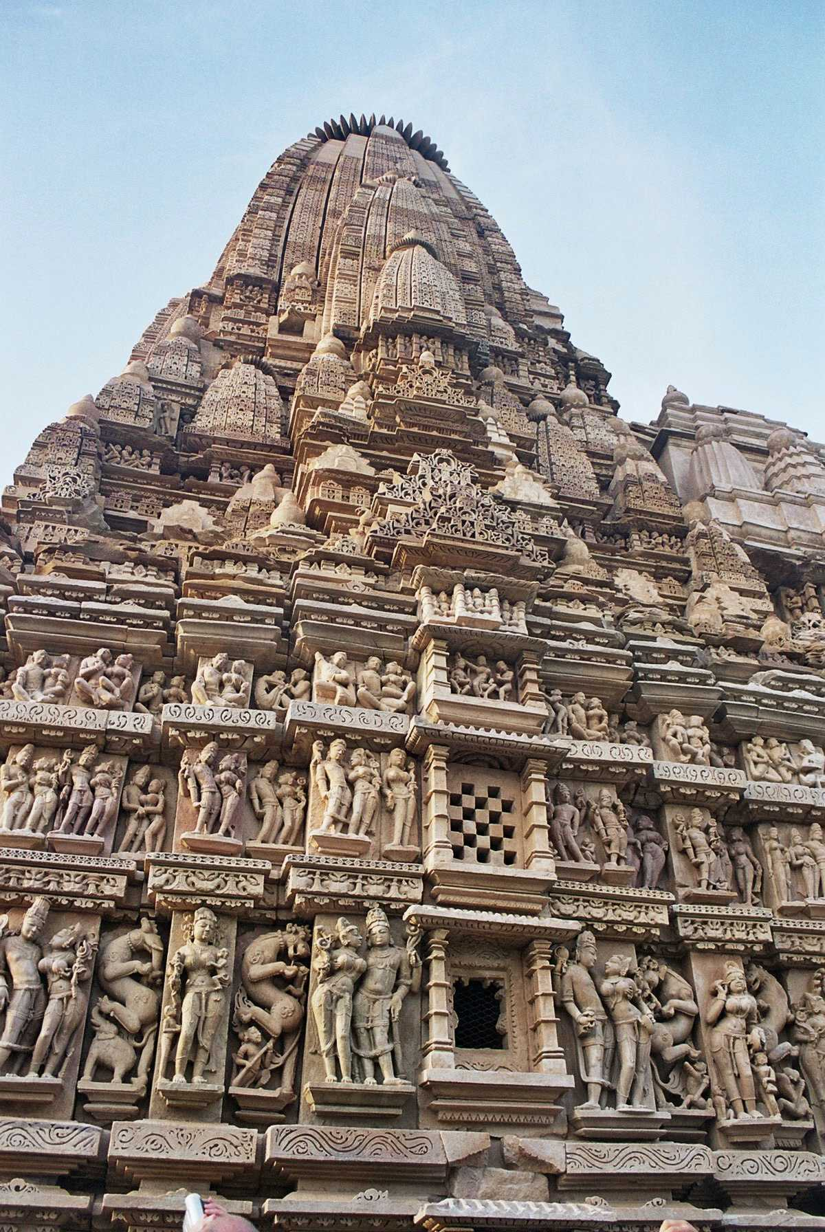 Khajuraho Temple, India Templo de Khajuraho, India. Picture take by User:Airunp